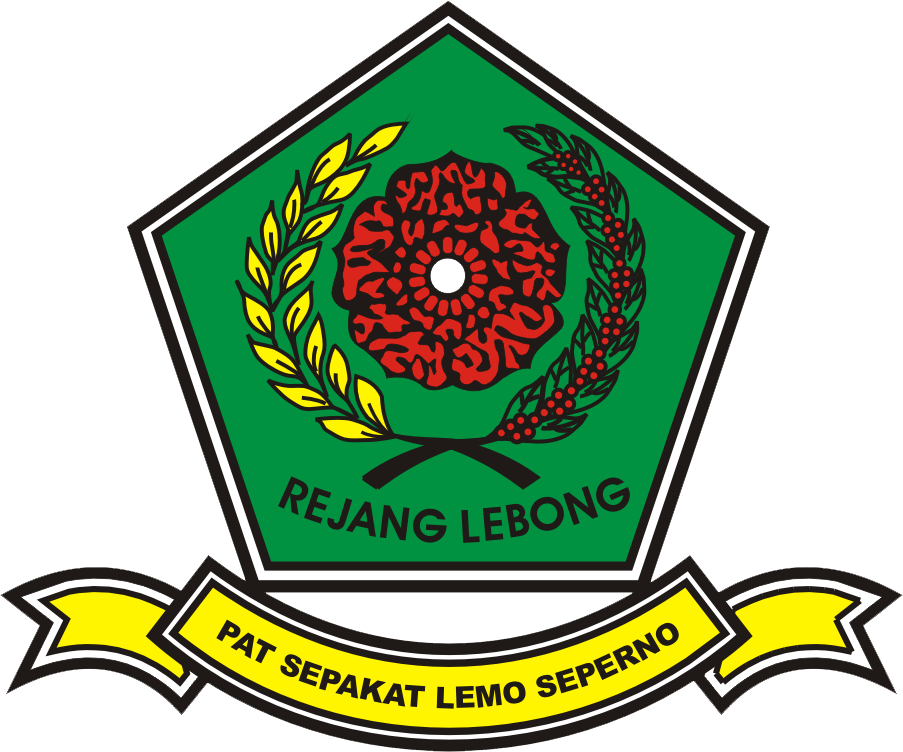 Logo kabupaten Rejang Lebong